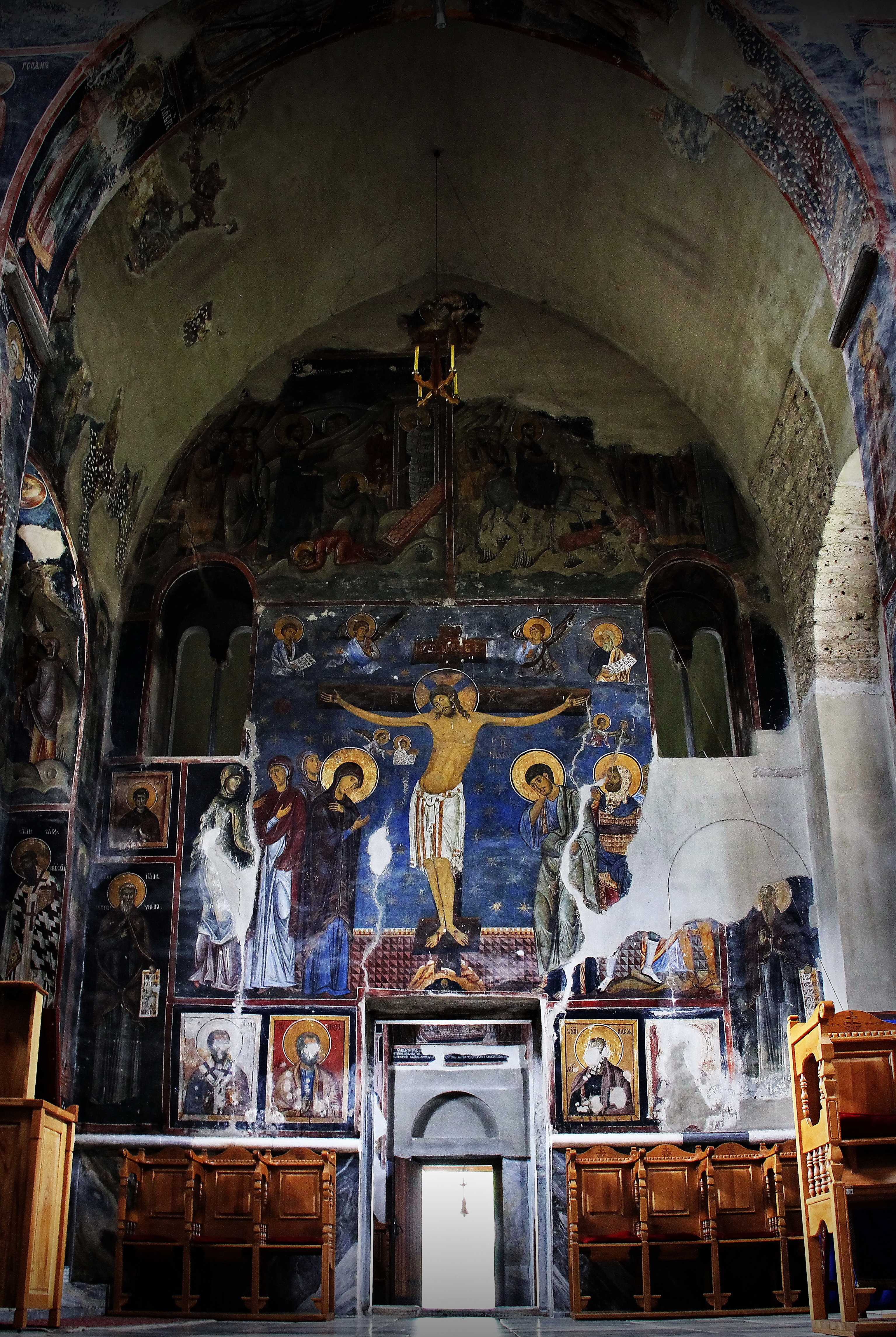 Raspeće Hristovo